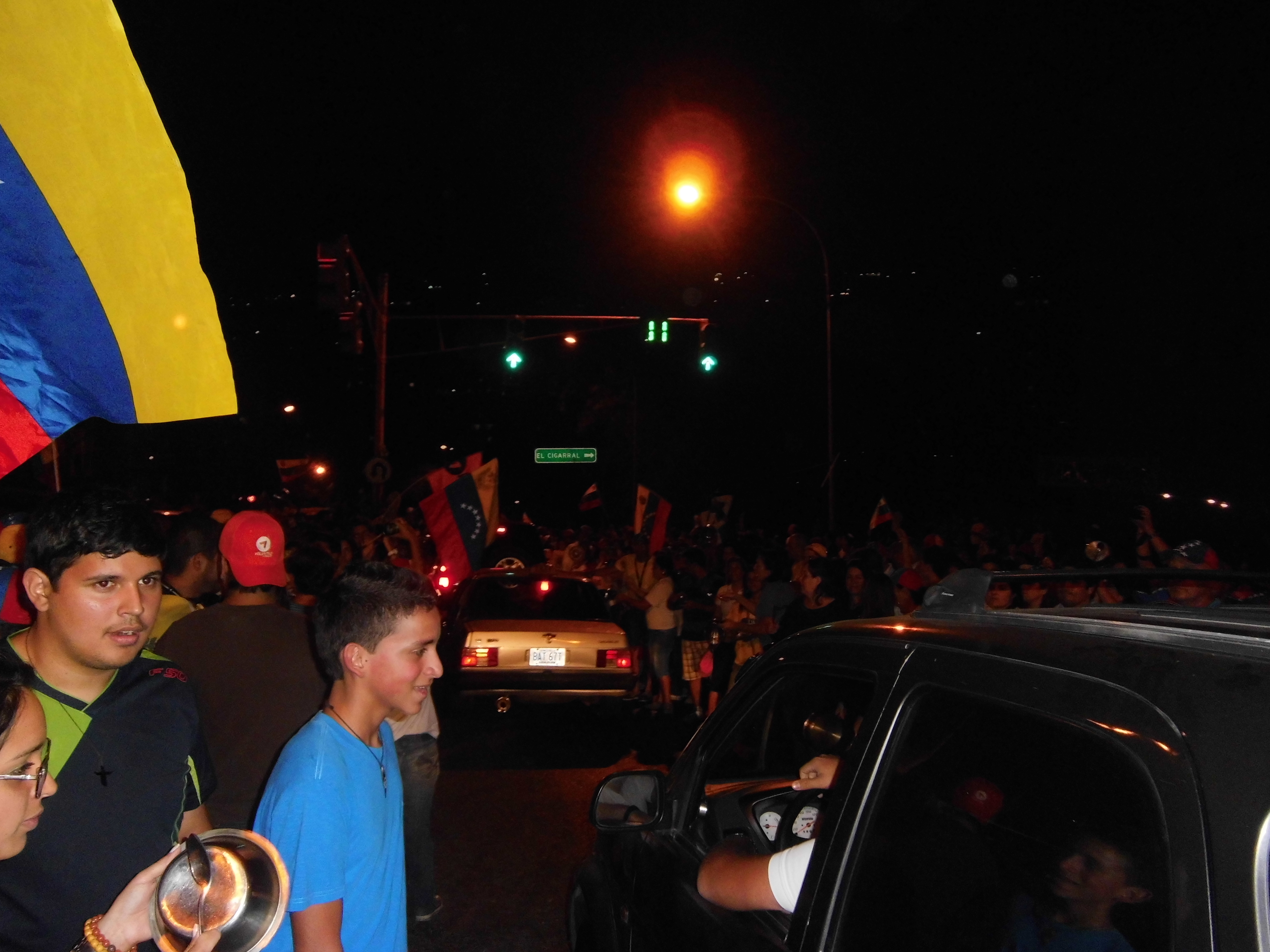 Cacerolazo contra Nicolás Maduro - La Boyera Municipio el Hatillo, Estado Miranda Venezuela día 15 de abril de 2013 hora 8:30 a 9:30 pm